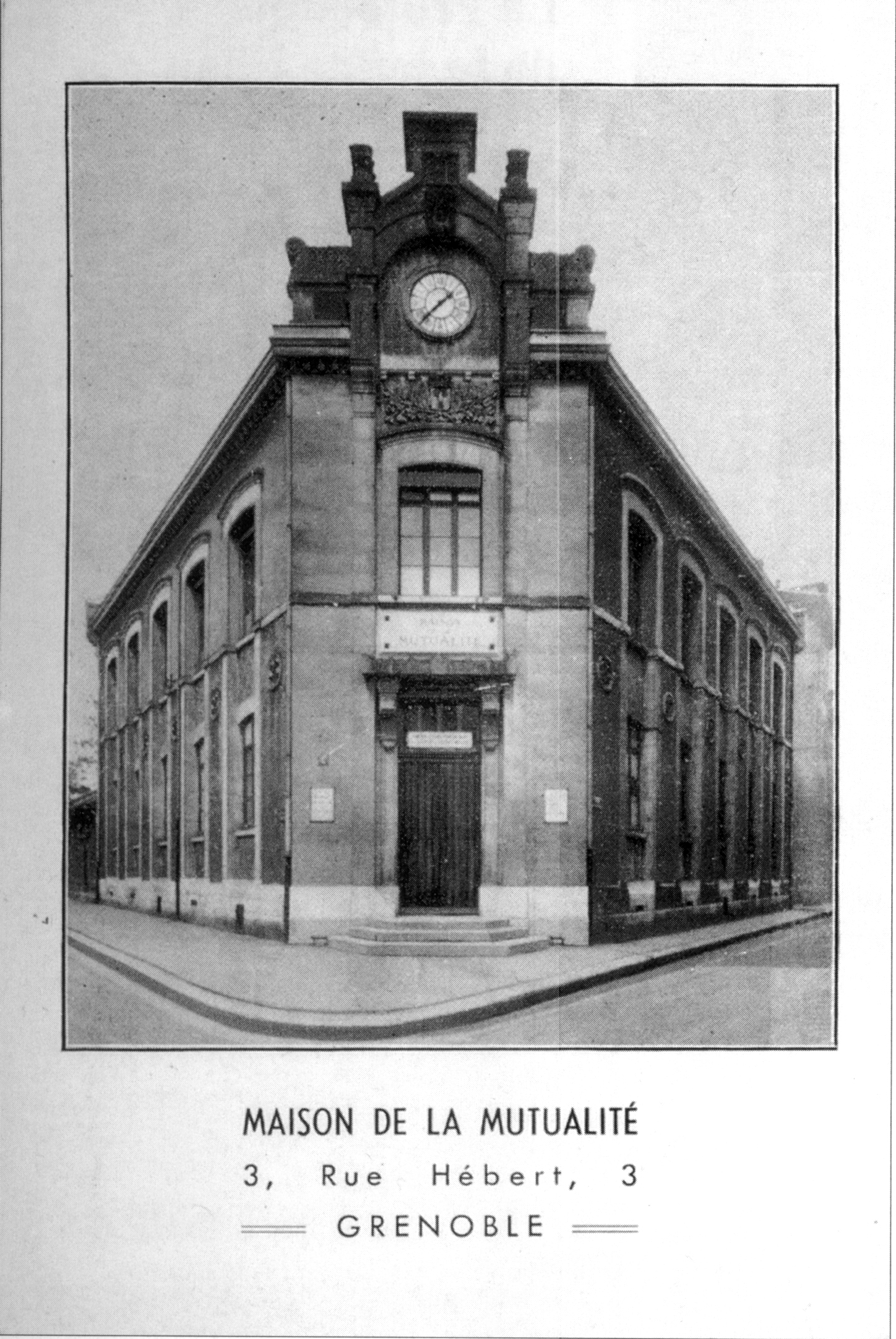 Grenoble, Maison de la mutualité. 3, Rue Hébert